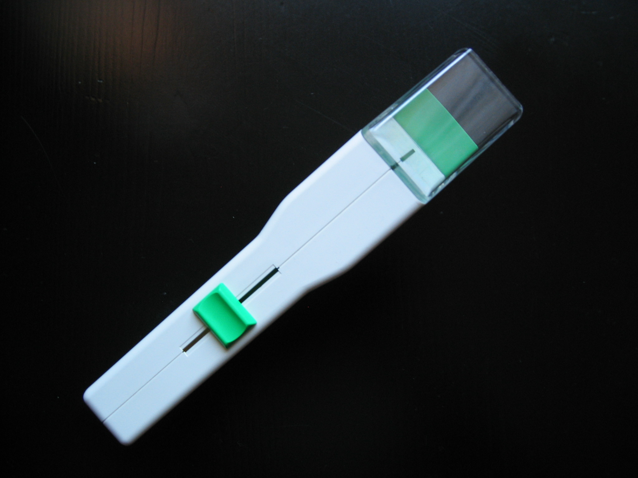 Snapy-Insektenfänger